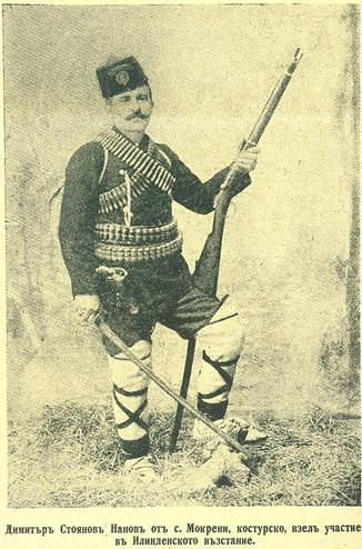 Димитър Стоянов Нанов.